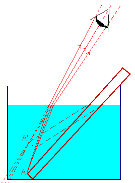 Schéma : interprétation de l'expérience du crayon brisé (schéma personnel) Catégorie:Schéma de physique